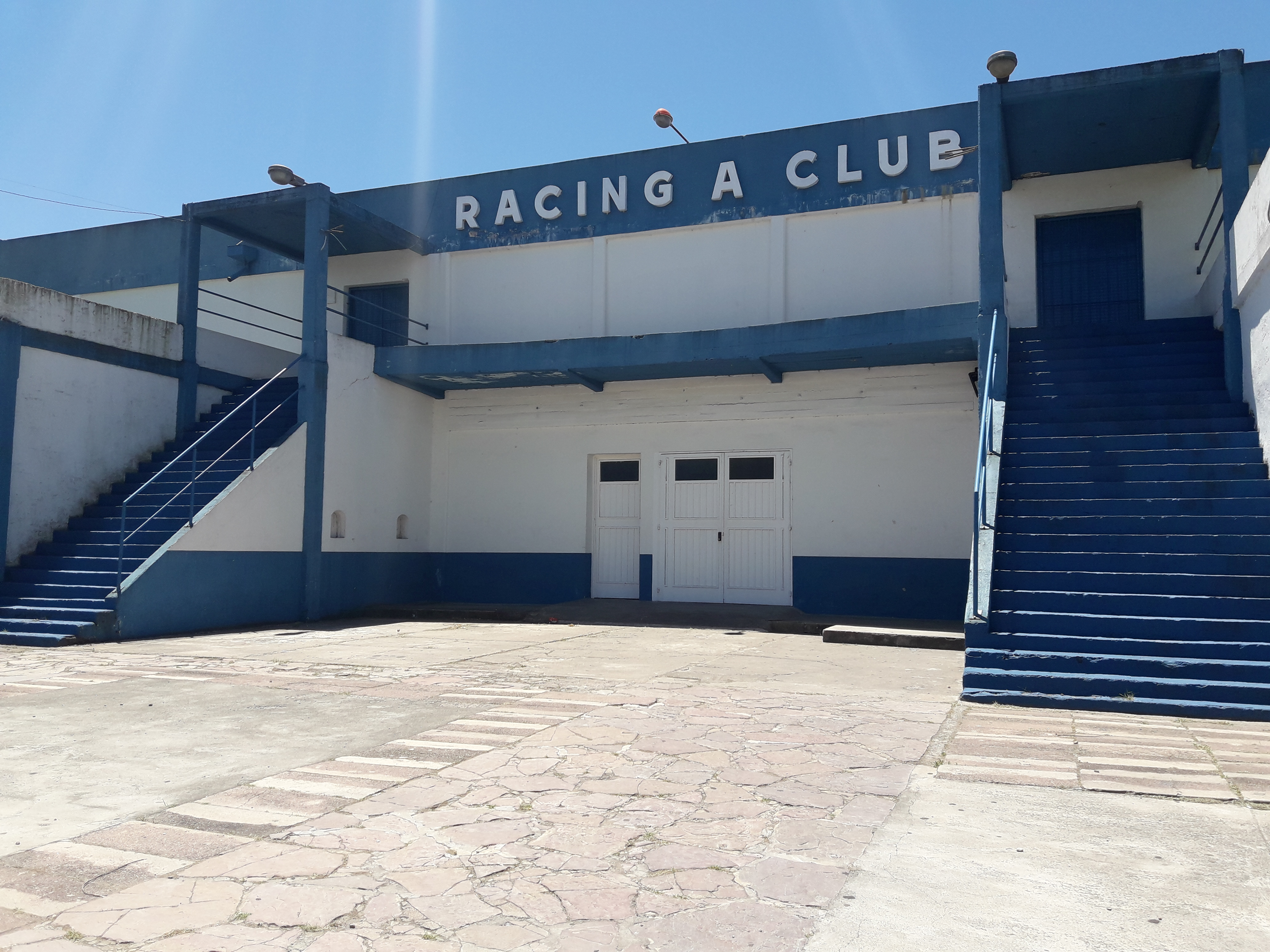 Foto frente del club